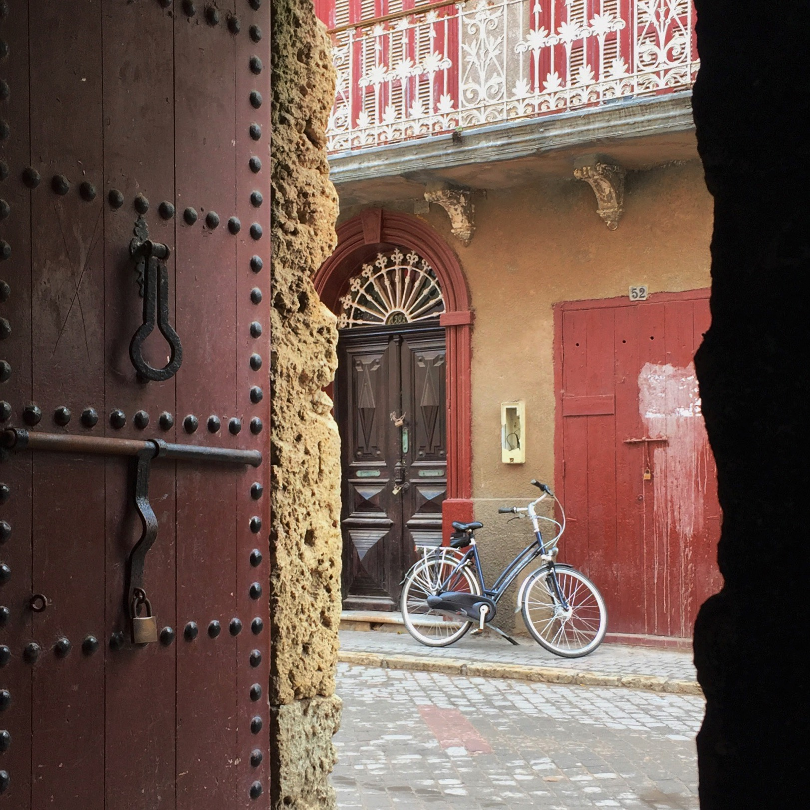 مدينة الجديدة المغربية، مازاجان القديمة